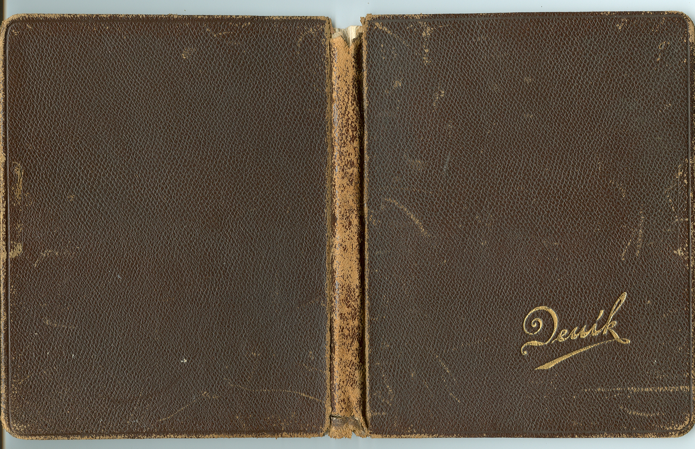 desky deníčku Věry Kohnové